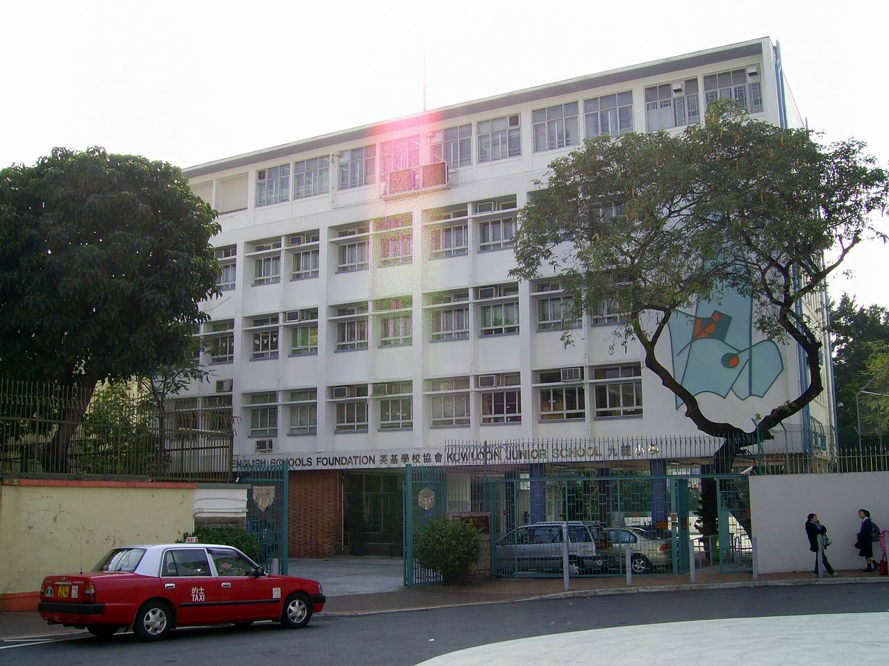 九龍小學（又一村）